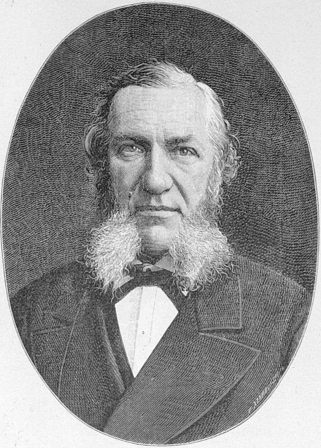 Ламанский Евгений Иванович